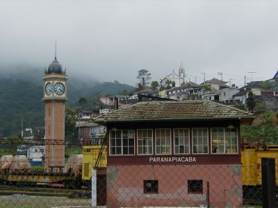 Vista de Paranapiacaba da parte baixa A view from Paranapiacaba village, in Santo André, Brazil.